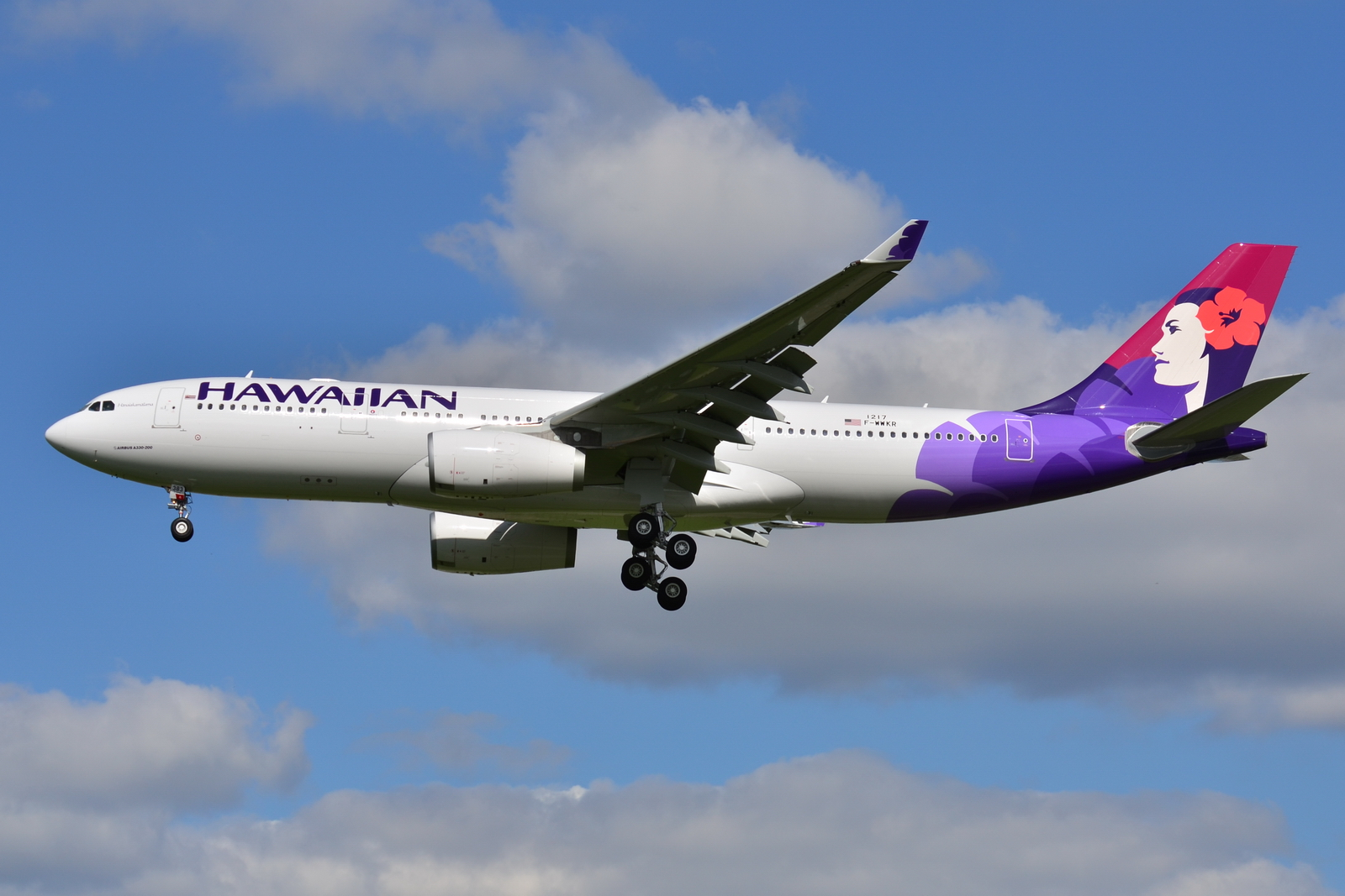 Photo prise à l'aéroport de Toulouse-Blagnac (LFBO) en France. Picture take at Toulouse-Blagnac Airport (LFBO) in France.